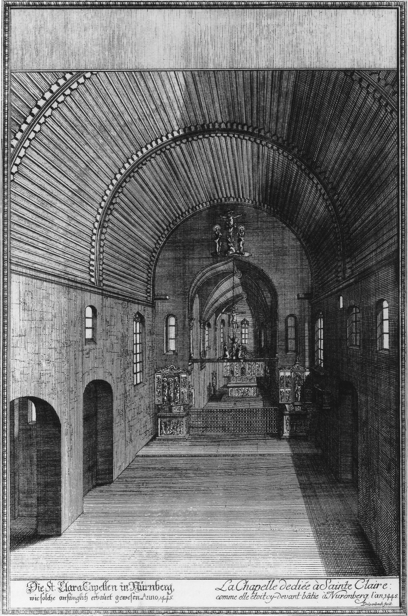 Innenansicht der Klarakirche in Nürnberg. Kupferstich von Johann Adam Delsenbach, um 1725.